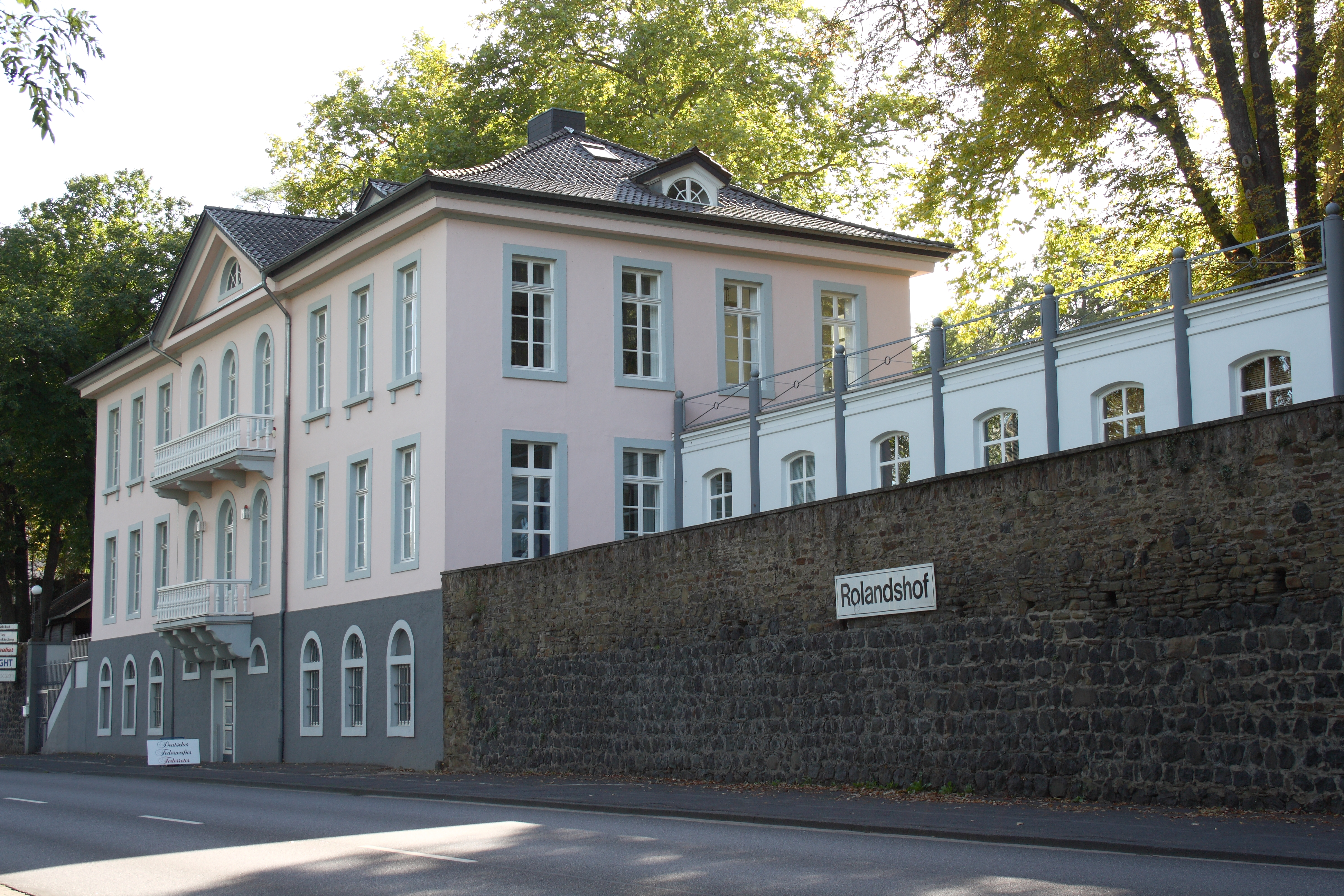 Rolandshof in Rolandswerth, Ortsteil von Remagen, im Landkreis Ahrweiler (Rheinland-Pfalz)